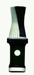 Cepillo sacapelo (herramienta de peluquería).